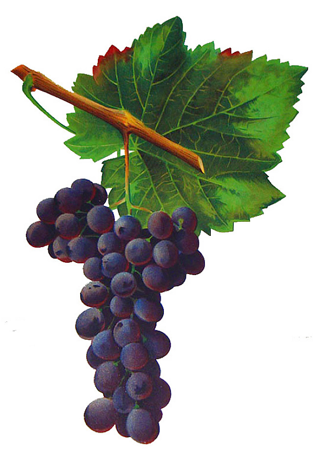 Grappe de Mecle par Viala et Vermorel